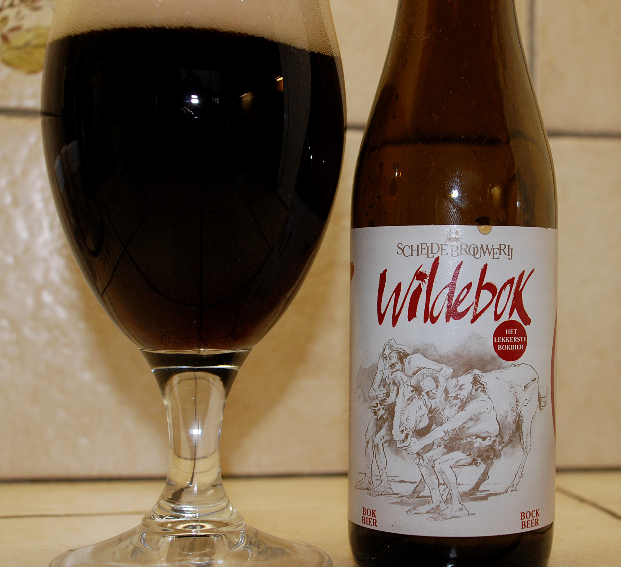 Belgisch-Nederlands biermerk